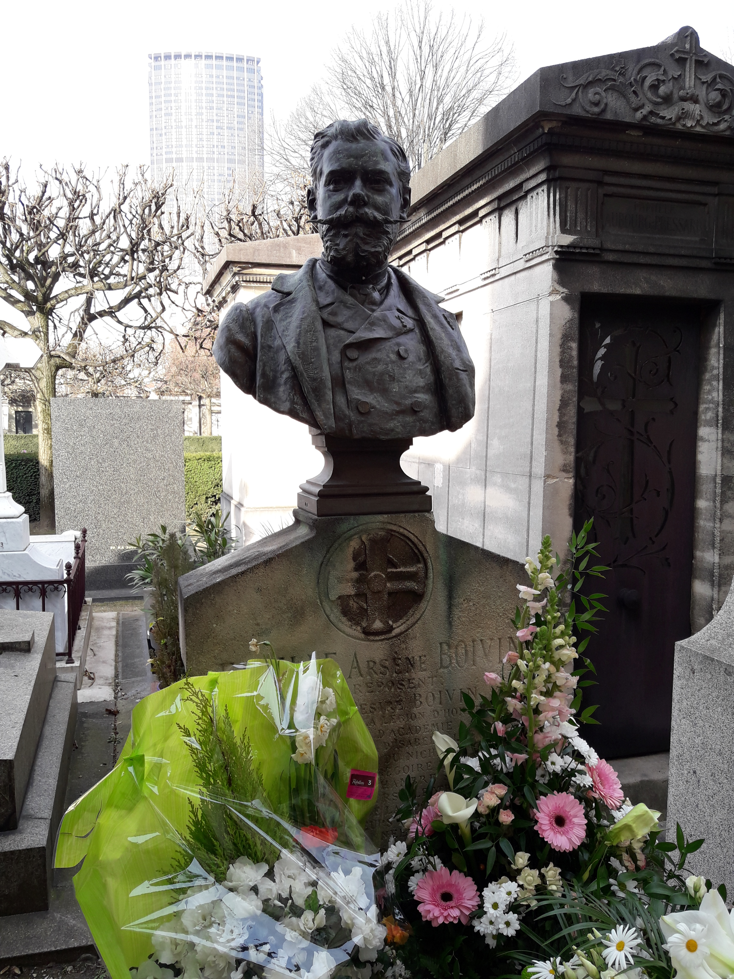 Tombe d'Arsène-Désiré Boivin (1840-1892), président de la chambre syndicale des constructeurs électriciens, membre de la société des sauveteurs de la Seine, chevalier de la Légion d'honneur. Elle est surmontée d'un buste en bronze de 70 cm de haut par Henri Allouard (18e division du cimetière du Montparnasse).